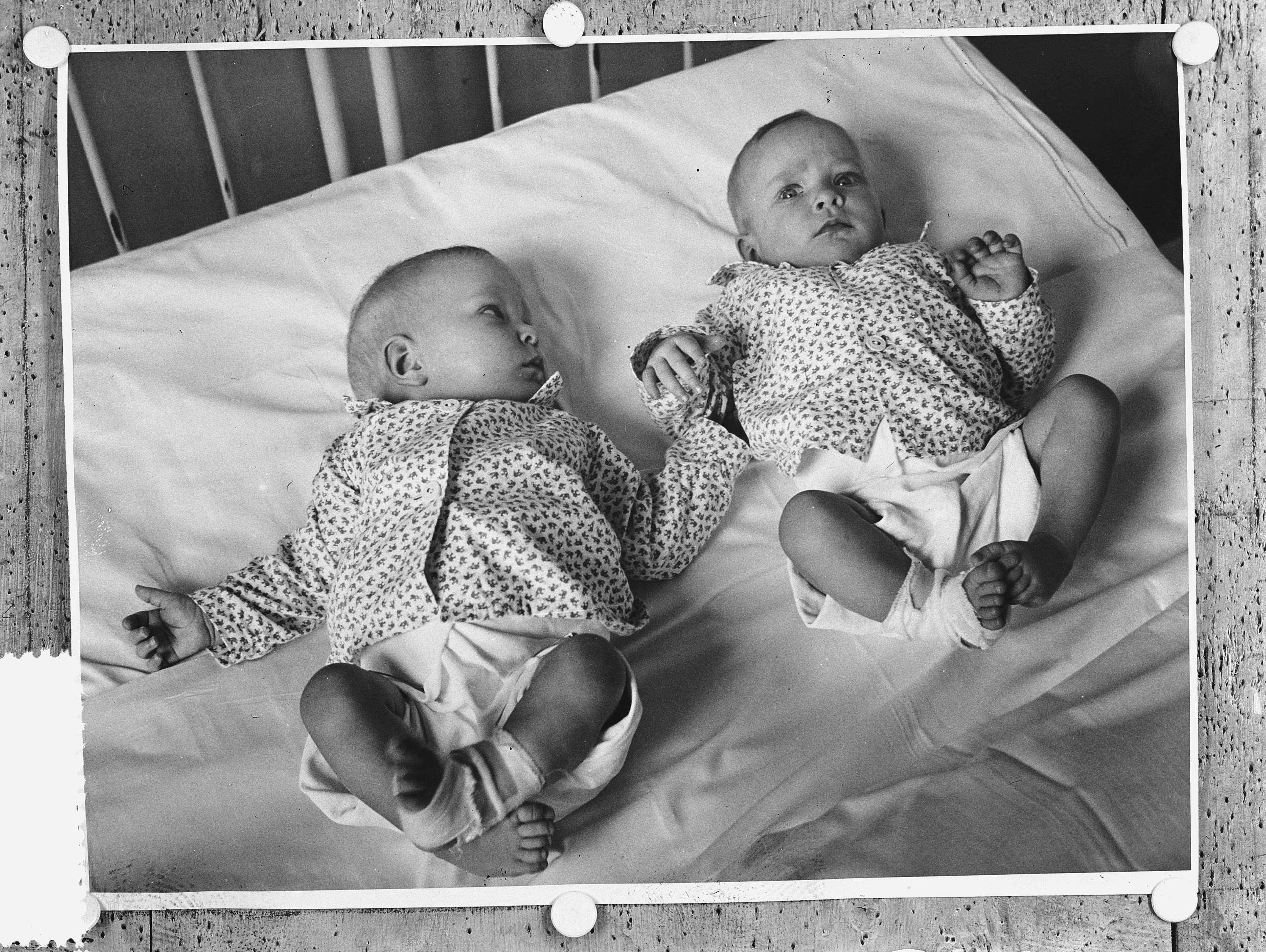 Collectie / Archief : Fotocollectie Anefo Reportage / Serie : [ onbekend ] Beschrijving : Siamese tweeling Folkje en Tjitske de Vries succesvol door operatie gescheiden Datum : 18 juni 1954 Locatie : Friesland, Leeuwarden Trefwoorden : babies, tweelingen, zuigelingen Persoonsnaam : Vries, Folkje de, Vries, Tjitske de Fotograaf : Popken, F.C.D. Auteursrechthebbende : Nationaal Archief Materiaalsoort : Glasnegatief Nummer archiefinventaris : bekijk toegang 2.24.01.09 Bestanddeelnummer : 906-5295